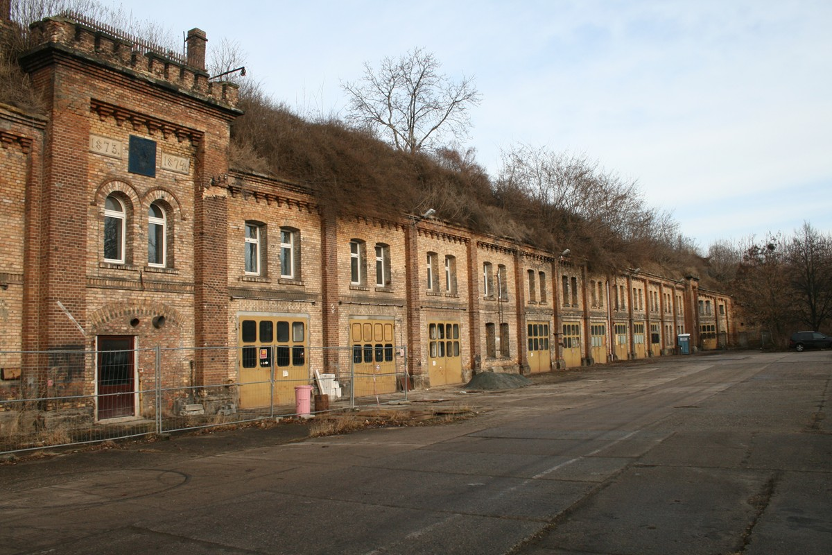 Magdeburg Kavalier 6